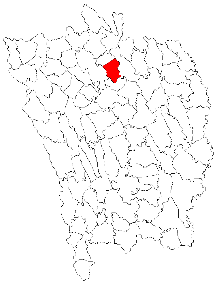 Categorie:Hărţi ale judeţului Vaslui